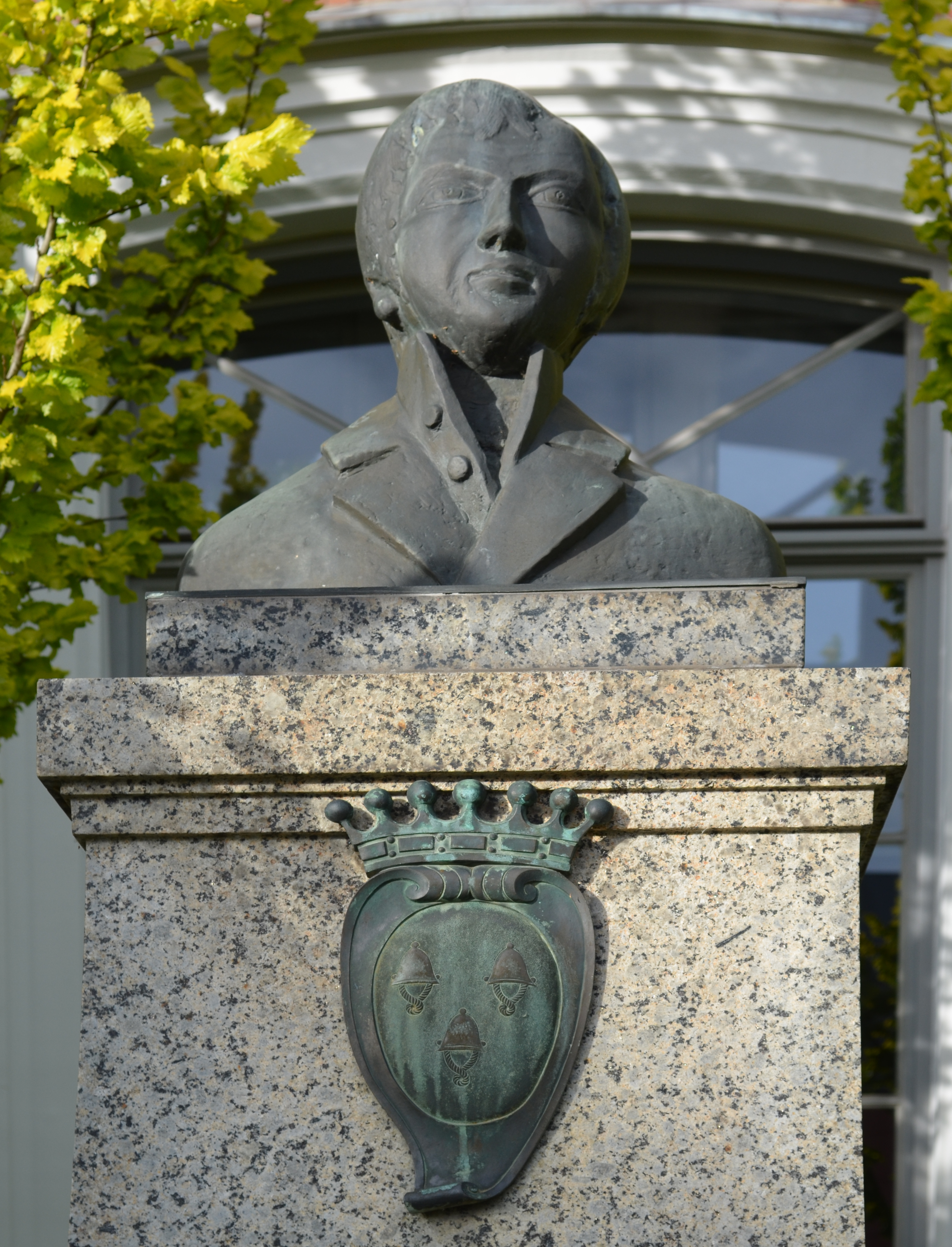 Bad Camberg, Freiherr von Schütz-Schule, Denkmal, Büste